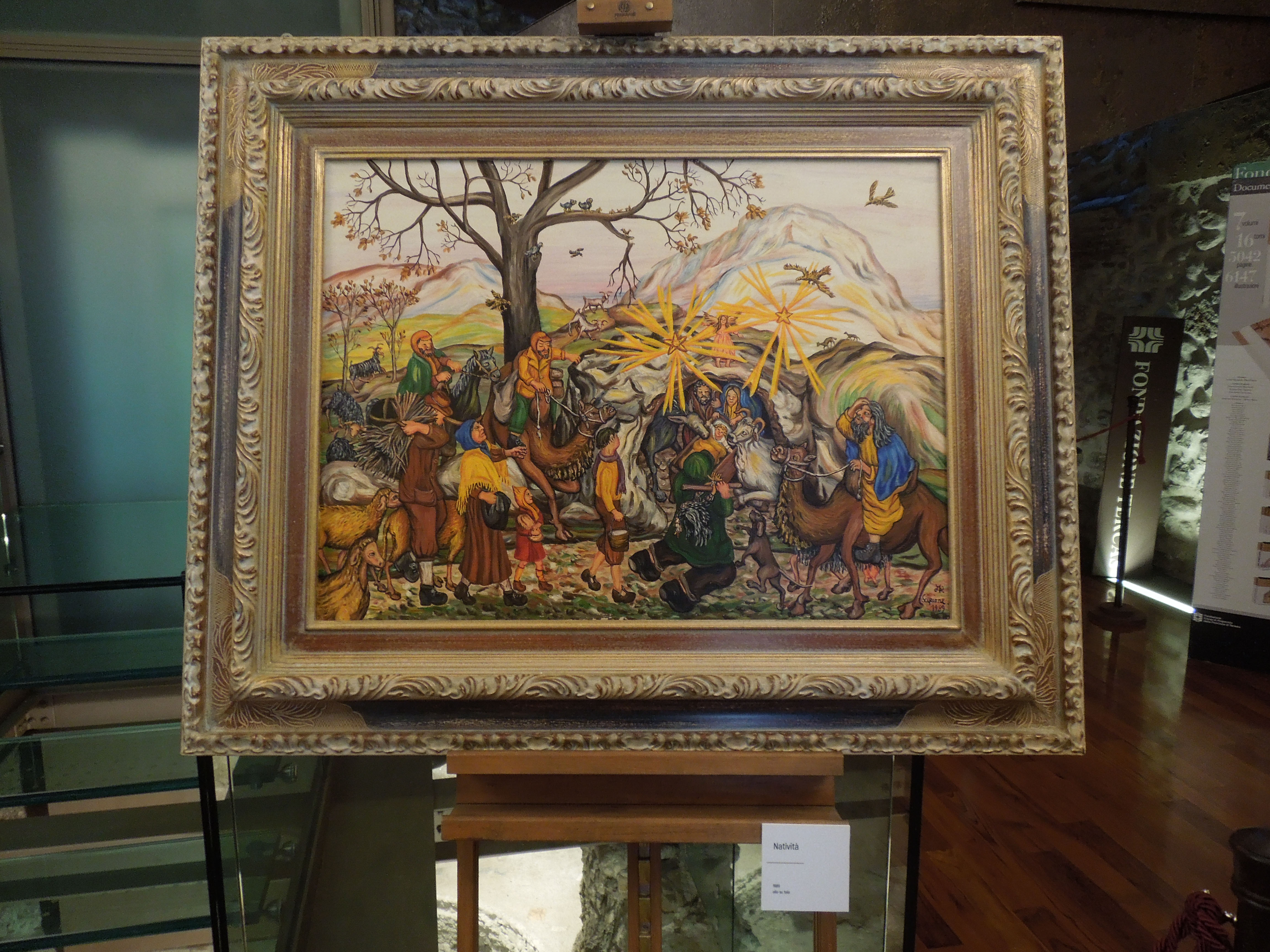 Dipinto intitolato Natività, eseguito dalla pittrice Annunziata Scipione, fotografato presso Palazzo Melatino, sede delle Fondazione Tercas, a Teramo in occasione della mostra “Il fuoco della terra” dedicata alle opere dell’artista.